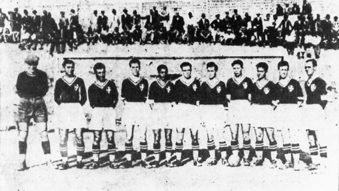 Η ομάδα του Εθνικού Πειραιώς Κυπελλούχος το 1933